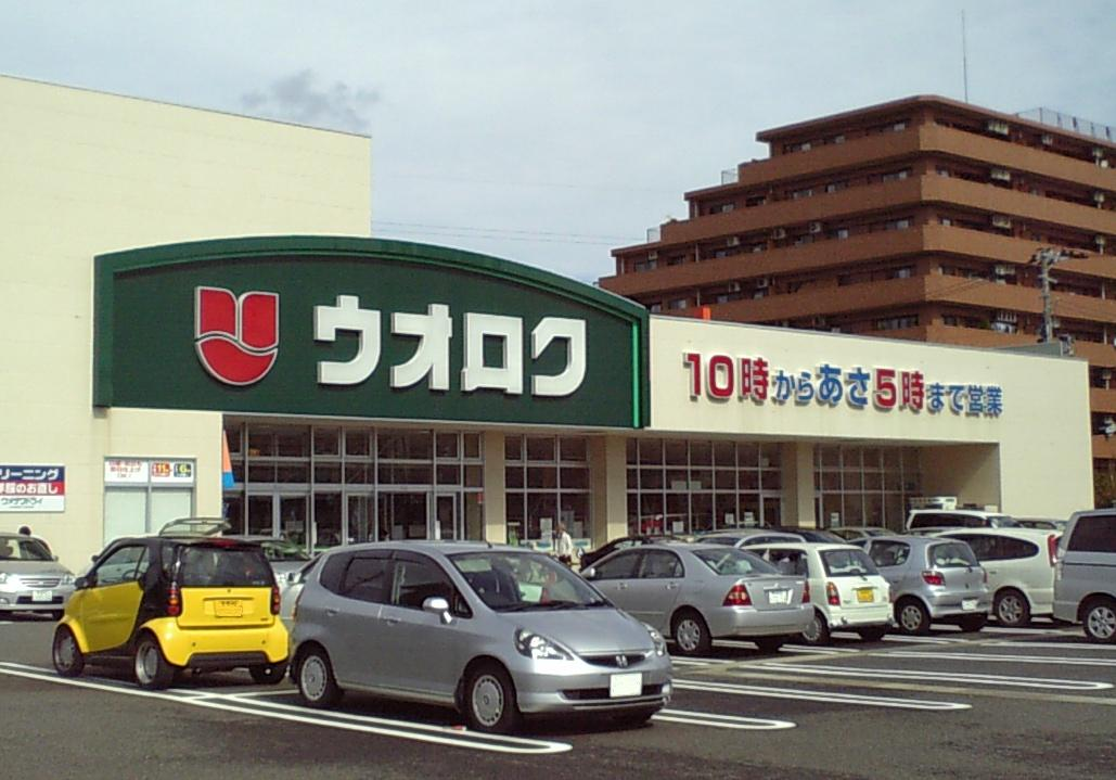 ウオロク神道寺店。